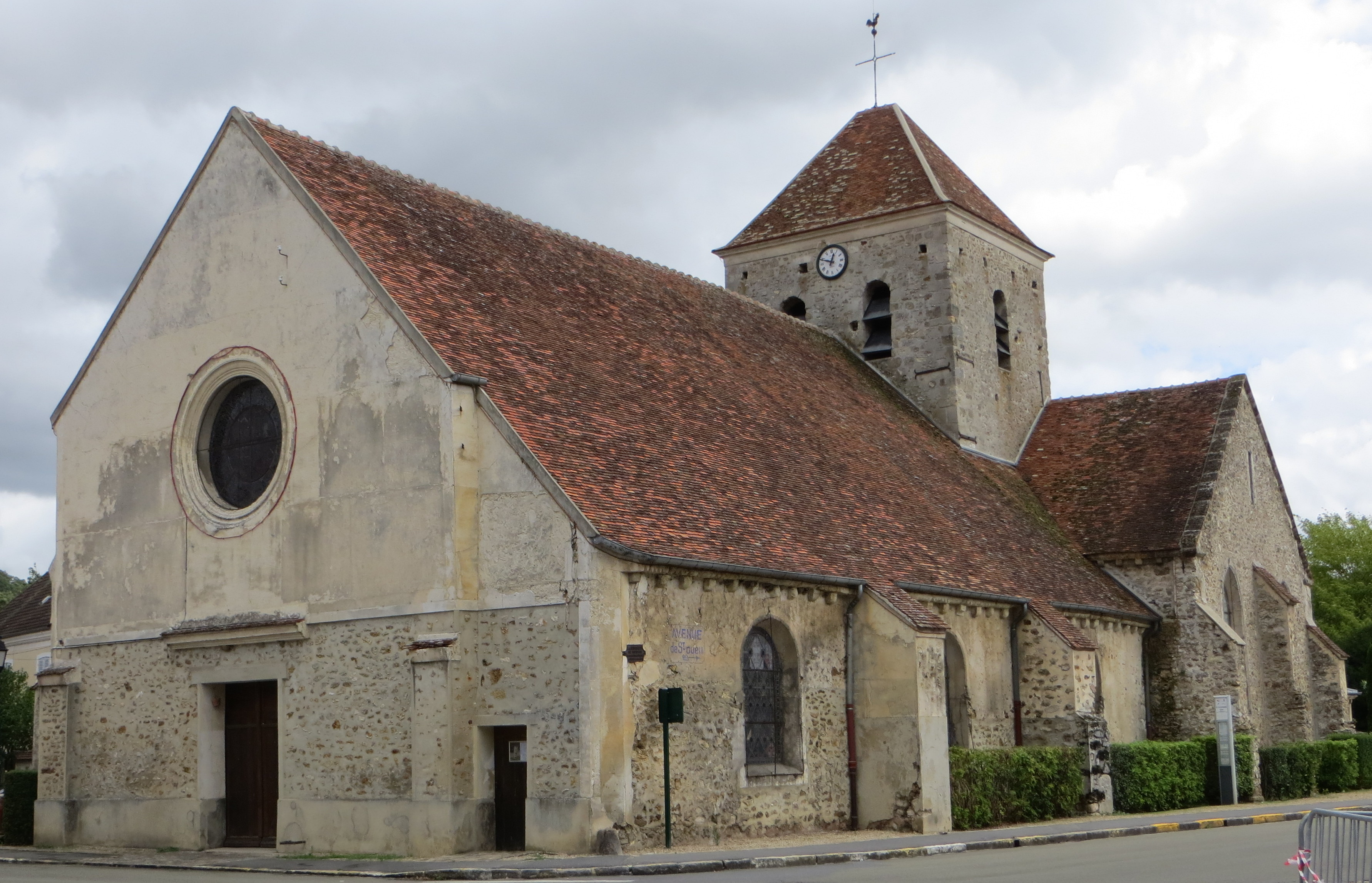 Vue de l'église